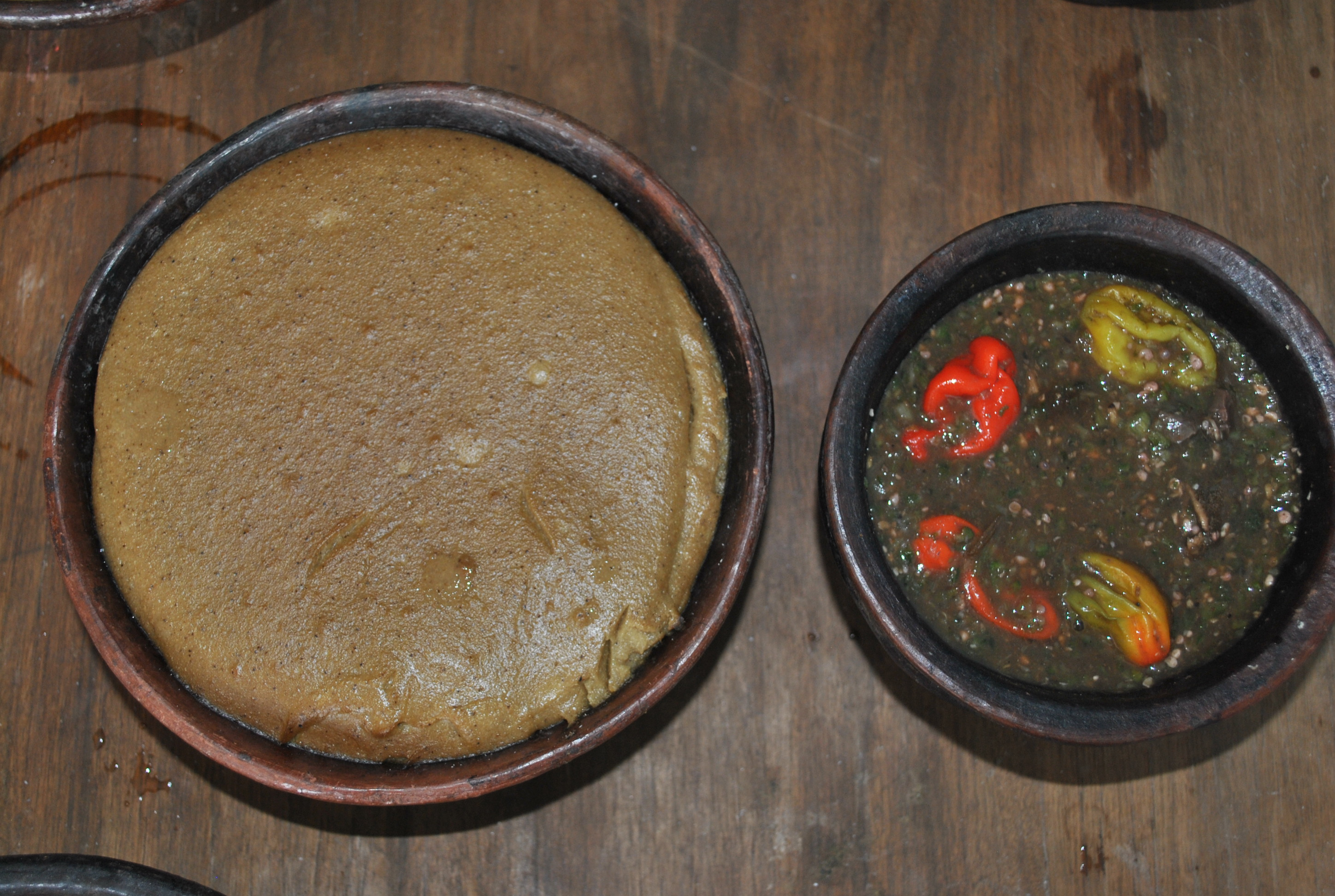 c'est un plat délicieux mangé en pays Senoufo accompagné d'une sauce gluante avec de la viande.Chez les senoufo de Ferké ce plat a une place de choix dans leur gastronomie car ils produisent beaucoup le mil. This is an image of food from Côte d'Ivoire